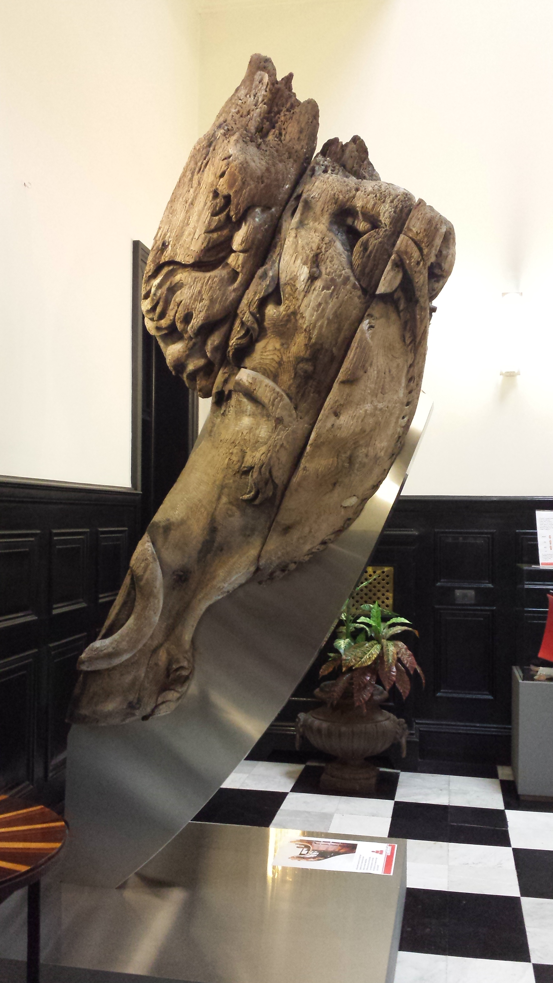 Mascardón de proa de la corbeta española la Atrevida